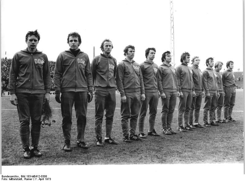 ADN-ZB Mittelstädt 12.4.73 Magdeburg: Qualifikationsspiel zur X. Fußball-Weltmeisterschaft. DDR gegen Albanien am 7.4.73 im Ernst-Grube-Stadion. 2:0 für die DDR. Die DDR-Elf vor Spielbeginn vlnr: Bernd Bransch, Jürgen Croy, Hans-Jürgen Kreische, Eberhard Vogel, Jürgen Sparwasser, Manfred Zapf, Lothar Kurbjuweit, Gerd Kische, Wolfgang Seguin, Joachim Streich und Peter Ducke.